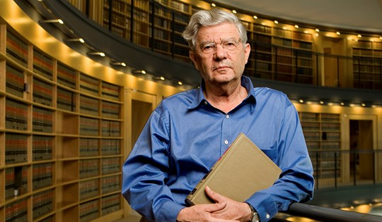 פרופסור למשפטים אהרון ברק